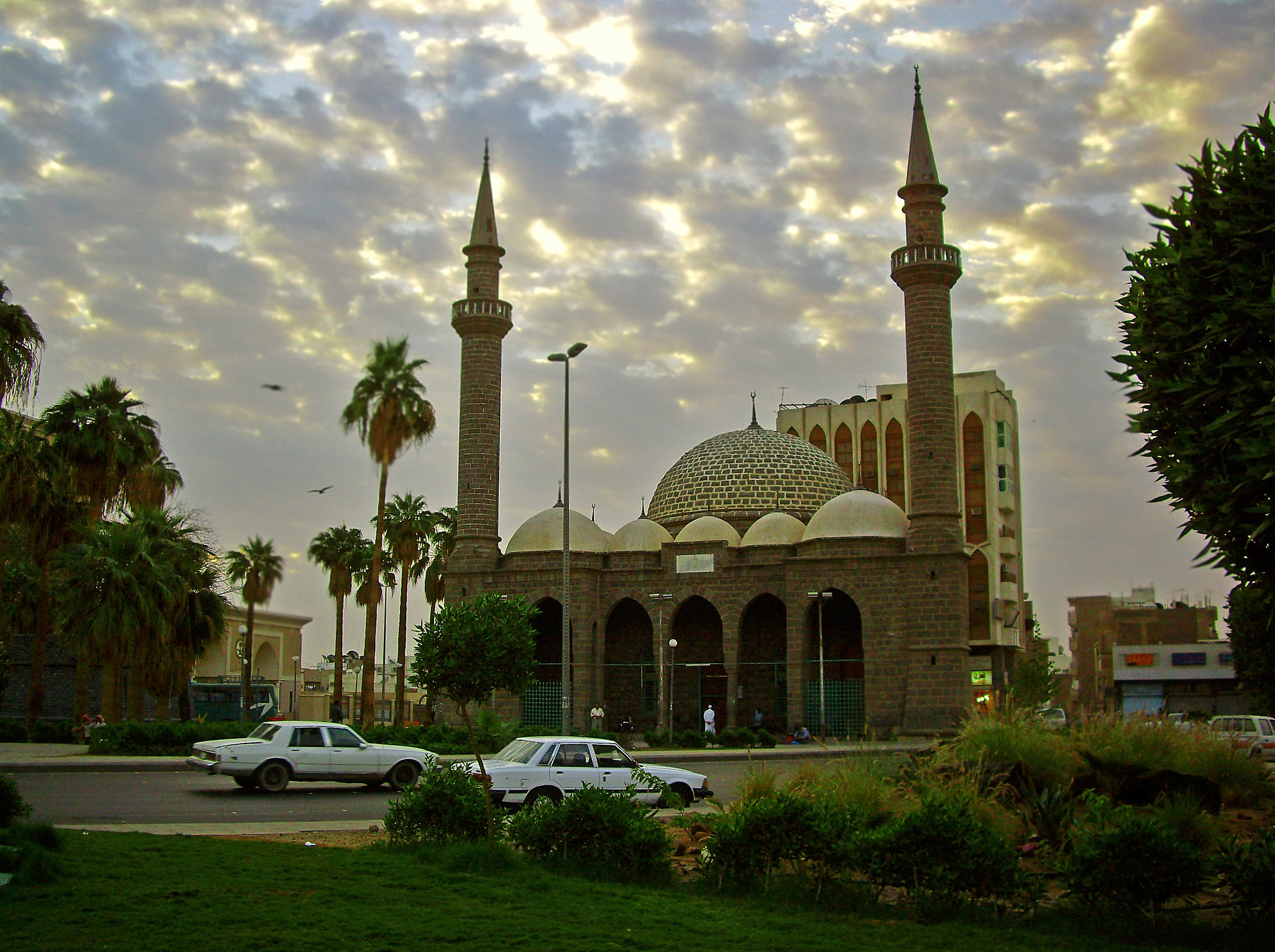 Mosque in Medina.